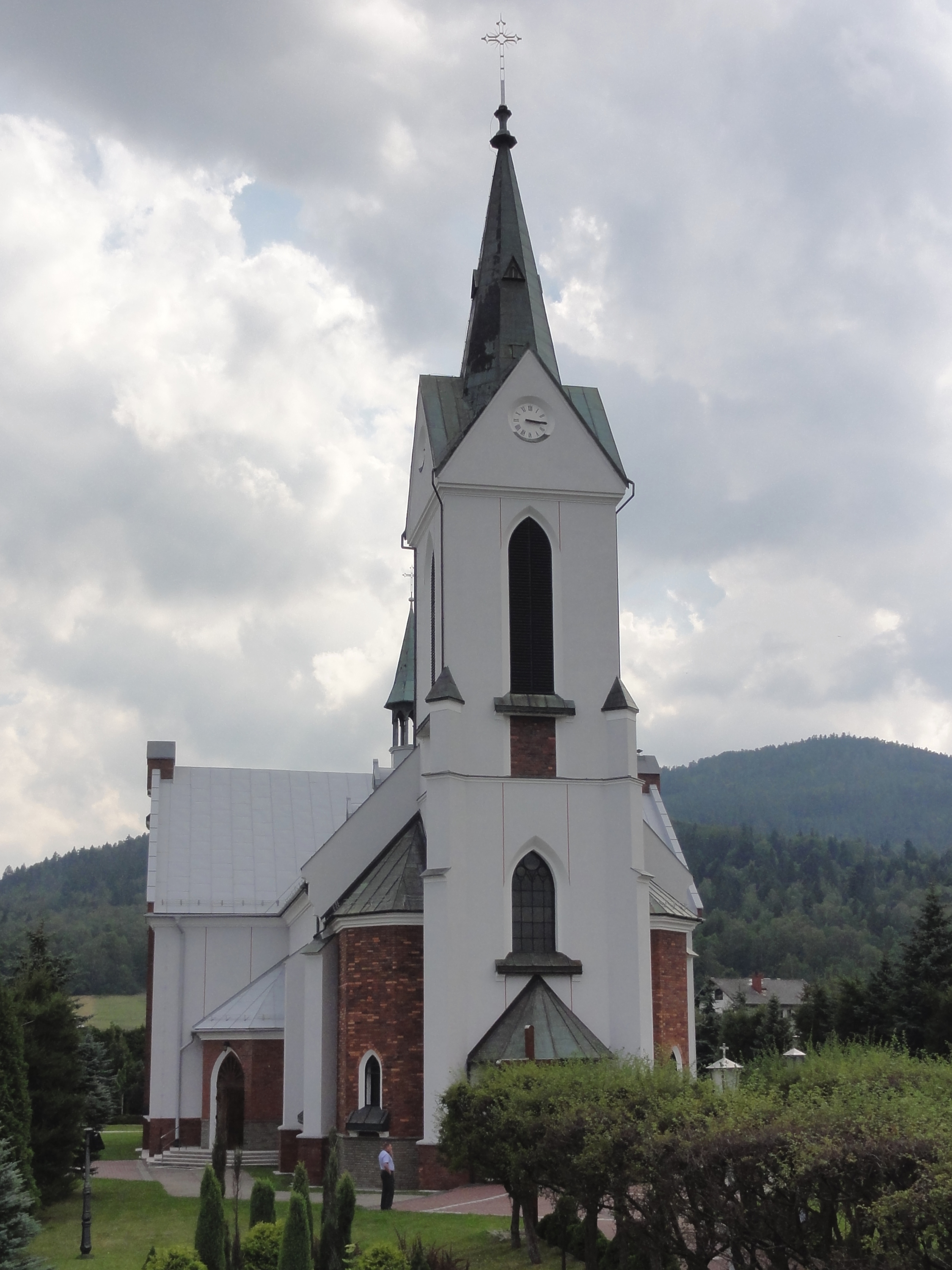 Kościół Przemienienia Pańskiego w Buczkowicach